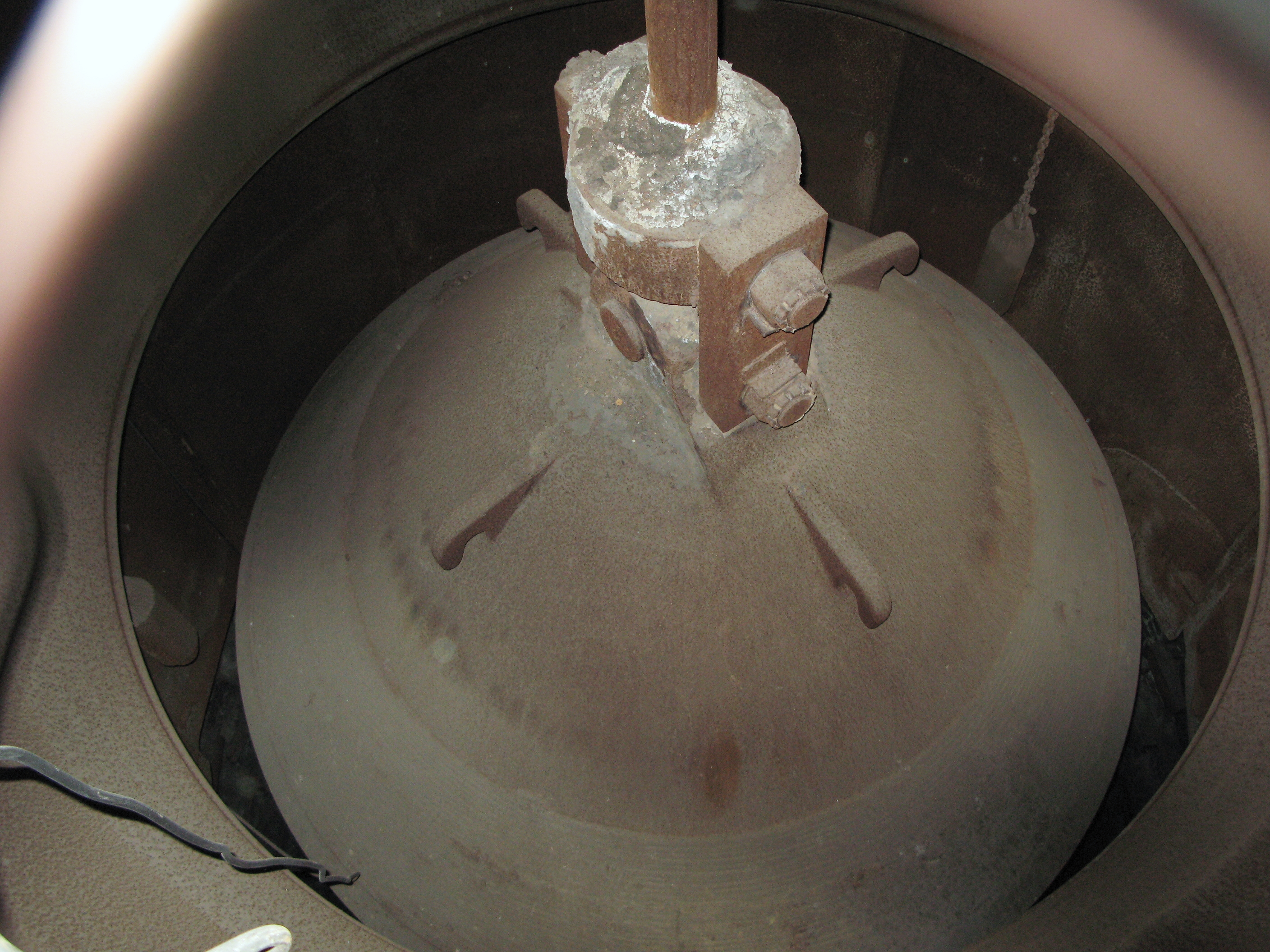 Великий конус засипного апарату доменної пічі у німецькому місті Дуйсбург, на території ландшафтного парку «Дуйсбурґ-Норд».